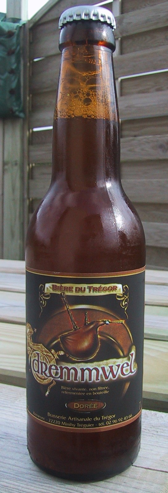 Dremmwel dorée (Bretagne, France)